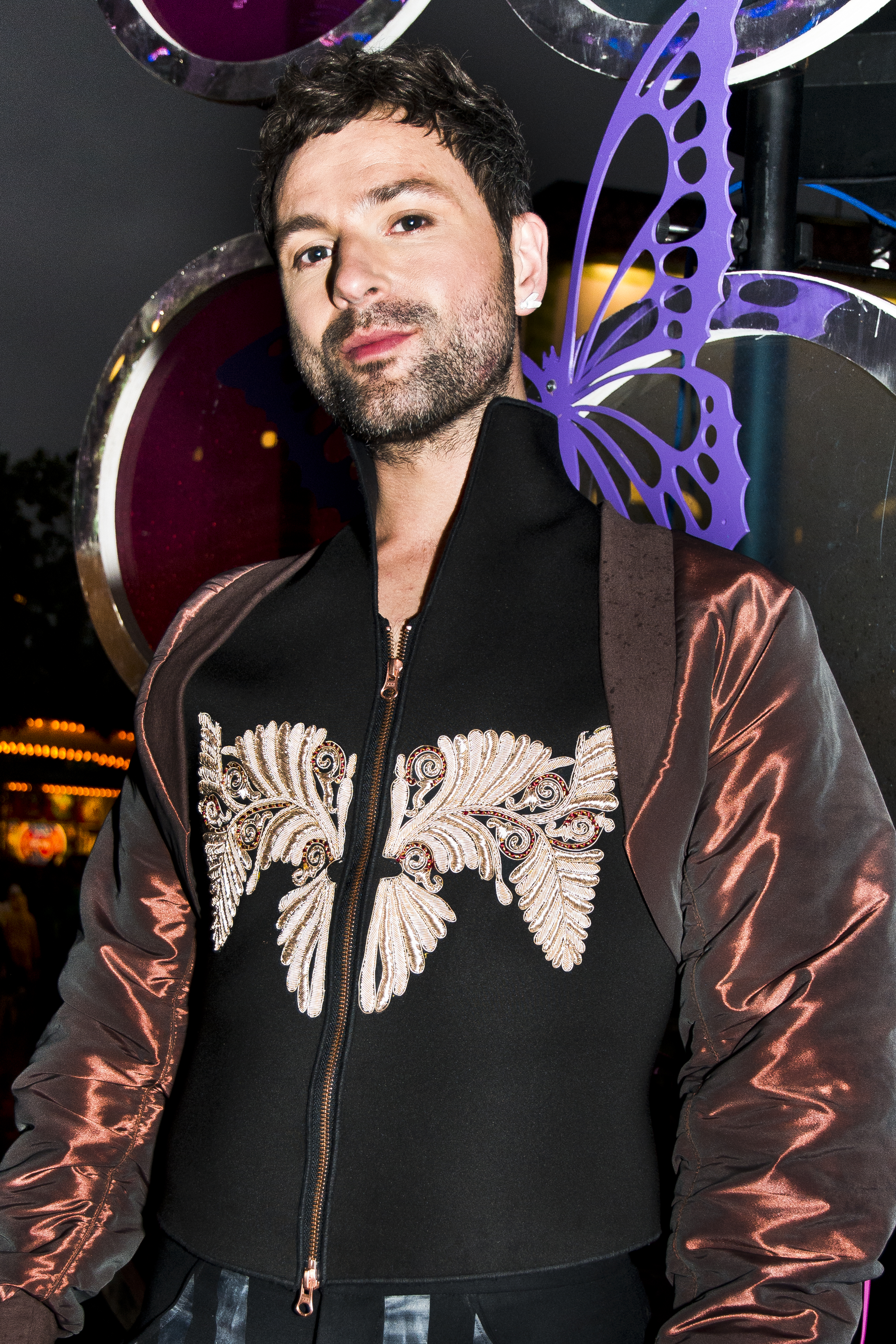 Ola Salo på Sommarkrysset 2015, Gröna Lund Stockholm.